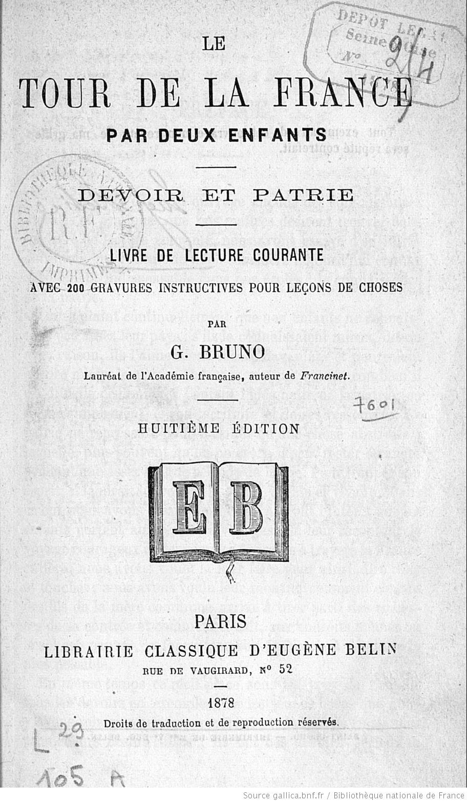 Le Tour de la France par deux enfants, manuel scolaire, édition de 1878, page de titre.